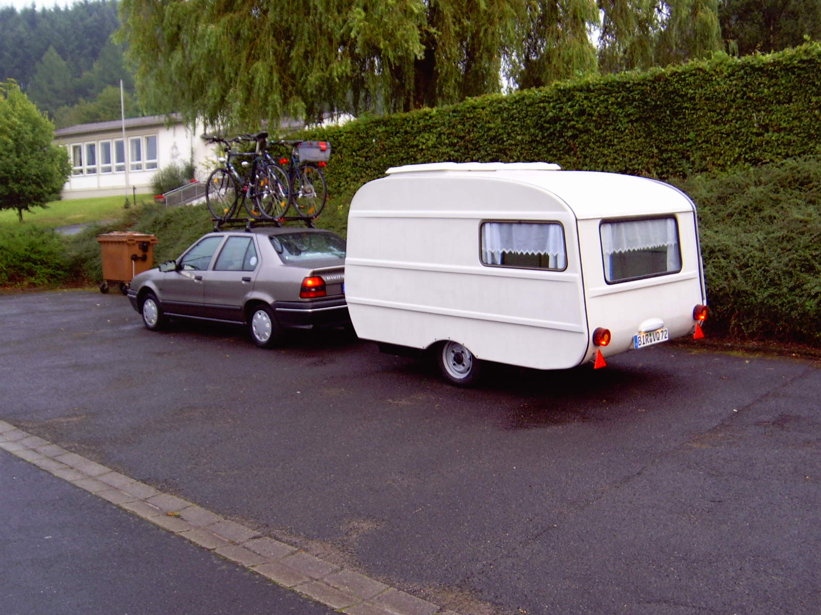 QEK-Junior HP 500.82/2, Baujahr 1982 hinter Renault 19 Chamade